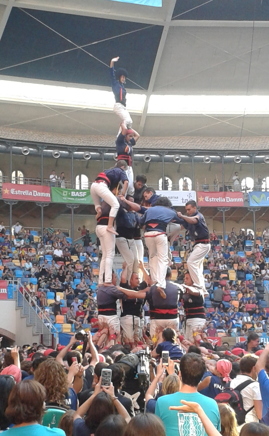 5de7 amb l'agulla carregat pels Xiquets del Serrallo al Concurs de Castells de Tarragona 2014